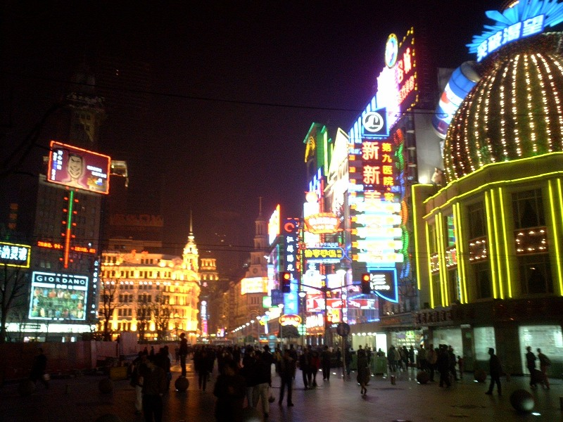 Nanjing Road|Nanjing Road, Shanghai|Nanjing Road at night.